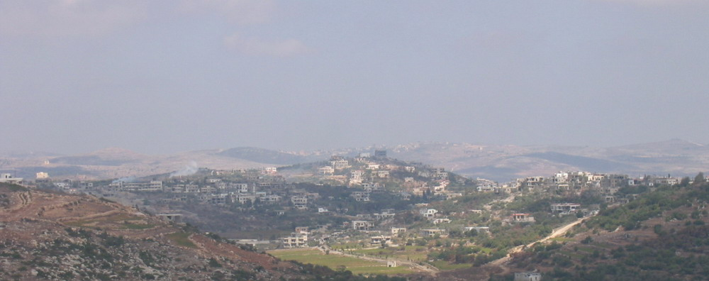 עייתא א-שעב - 2006